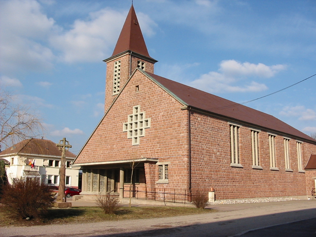 Saulcy-sur-Meurthe Commune des Vosges L'église Saint-Jean-Baptiste Photographie personnelle, prise le 15 mars 2006 Copyright © Christian Amet